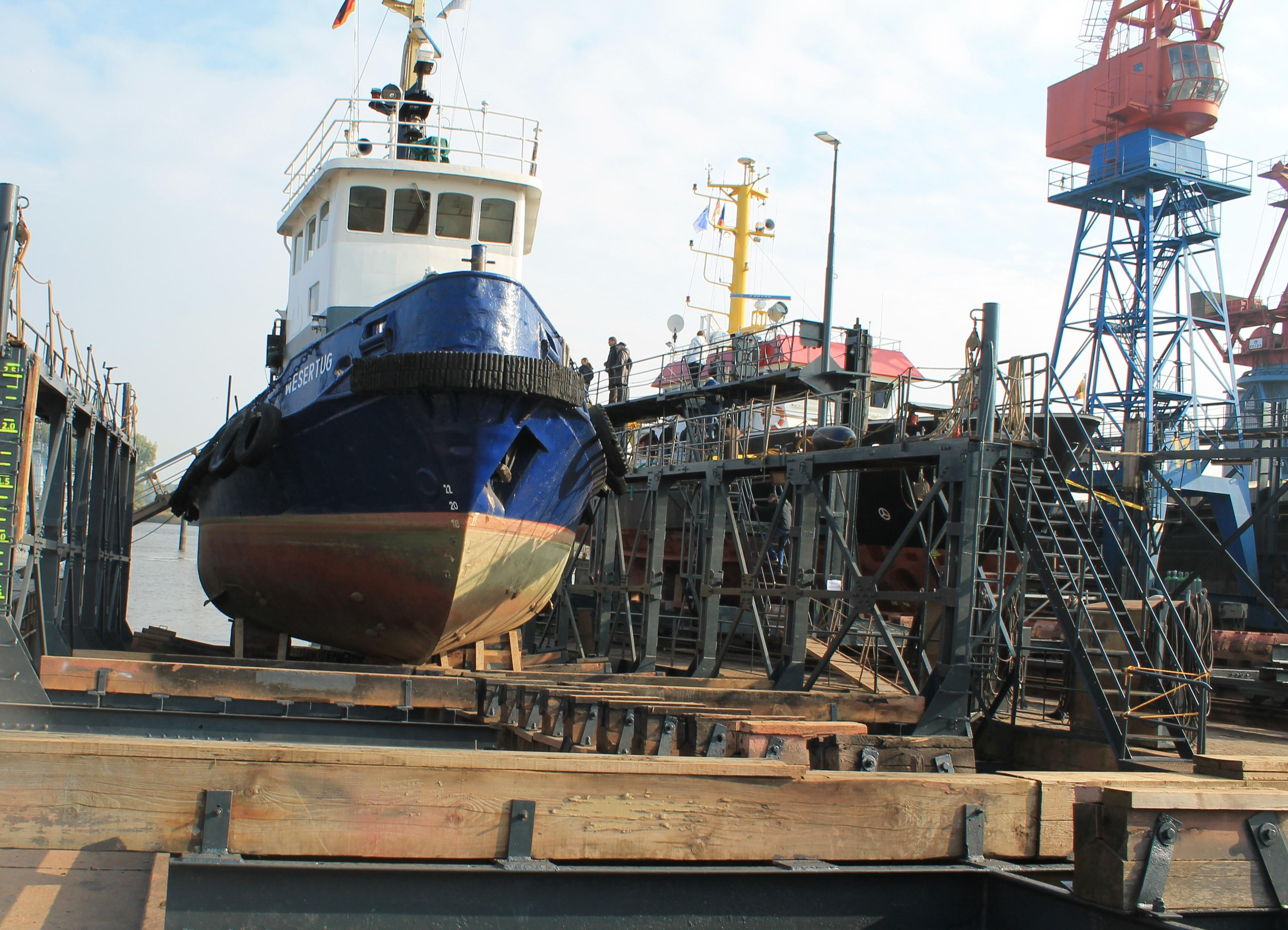 Elsflether Werft Werftrundgang 2, Blick auf die Slipanlagen von der Landseite